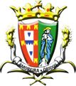 Brasão da Freguesia da Amoreira